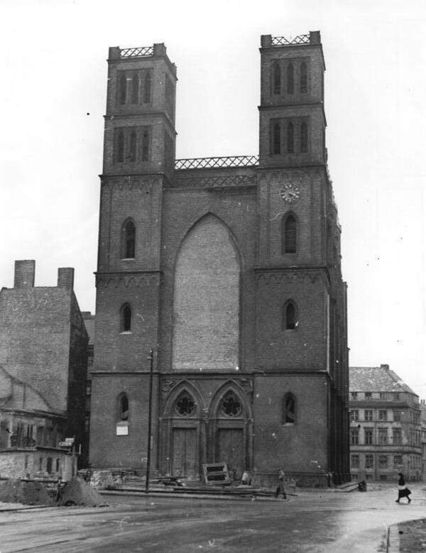 Historische Berliner Kirchen werden wieder aufgebaut. Laut Beschluss des demokratischen Magistrats werden in diesem Jahr an den im demokratischen Sektor unter Denkmalschutz stehenden Kirchen zahlreiche Reparaturarbeiten vorgenommen. Die St.Hedwigs-Kathedrale soll eine neue Kuppel erhalten, auch die Elisabeth-Kirche wird restauriert werden. An der Parochial-Kirche wird bereits gearbeitet und die Arbeiten die die Friedrich-Werdersche Kirche vor dem Verfall schützen sollen, sind bereits abgeschlossen. ADN Nr. 955 Friedrich Werdersche Kirche